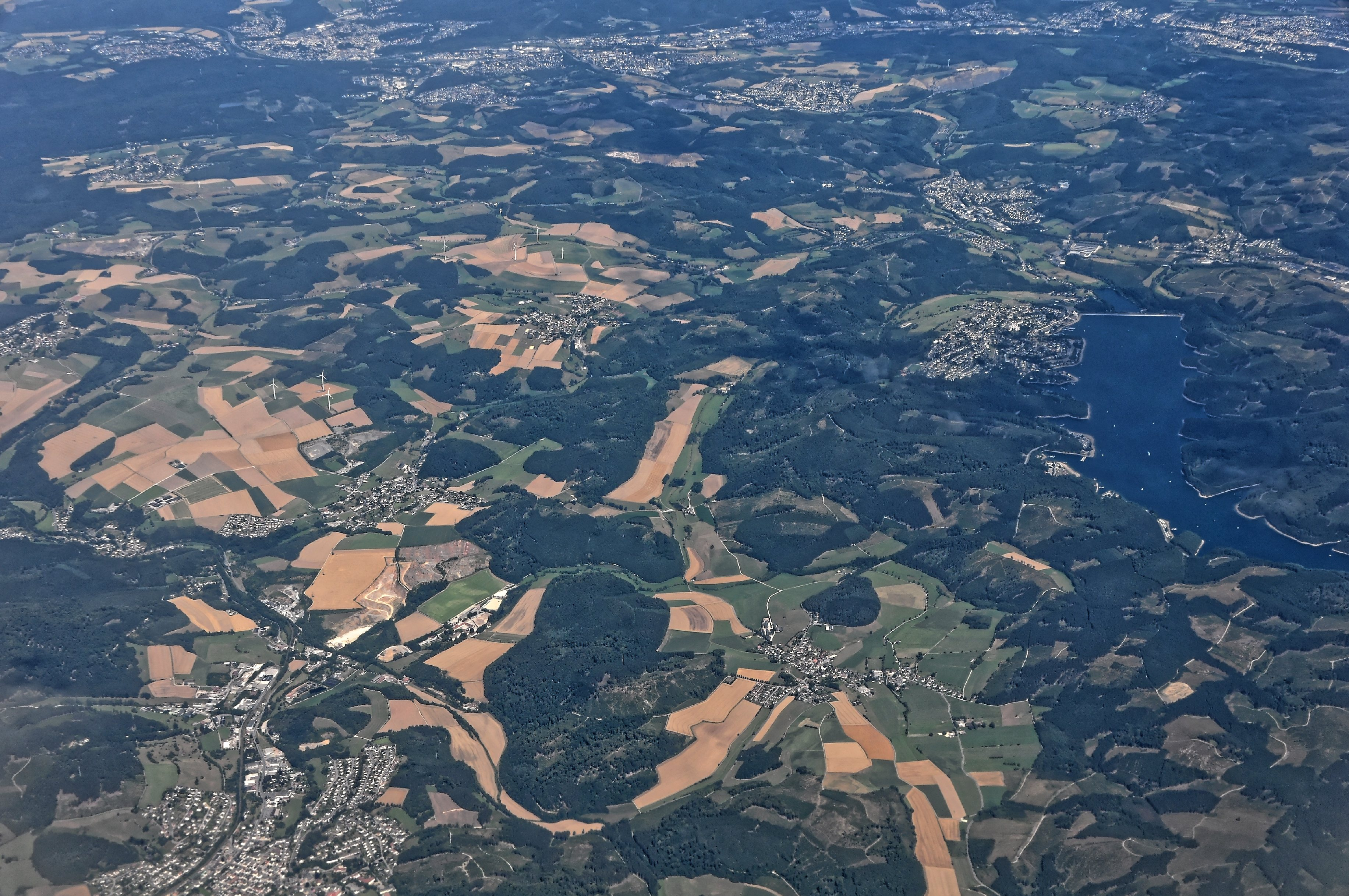 Bilder vom Flug -Rom-Düsseldorf-Hamburg 2013 Dieses Foto entstand in Zusammenarbeit mit Stadtbesichtigungen.de Die Seiten Stadtbesichtigungen.de, der dazugehörige Reise Blog sowie die Facebookseite: Stadtbesichtigungen Rom dürfen dieses Bild für Ihre Veröffentlichungen ohne den Hinweis auf Wikipedia, Commons bzw der Lizenz verwenden. Die Verantwortlichen habe von mir (Ra Boe) die Originaldaten zur freien Verfügung übermittelt bekommen.